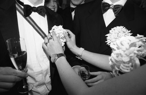 Debütanten auf dem Chrysanthemenball im Deutschen Theater München